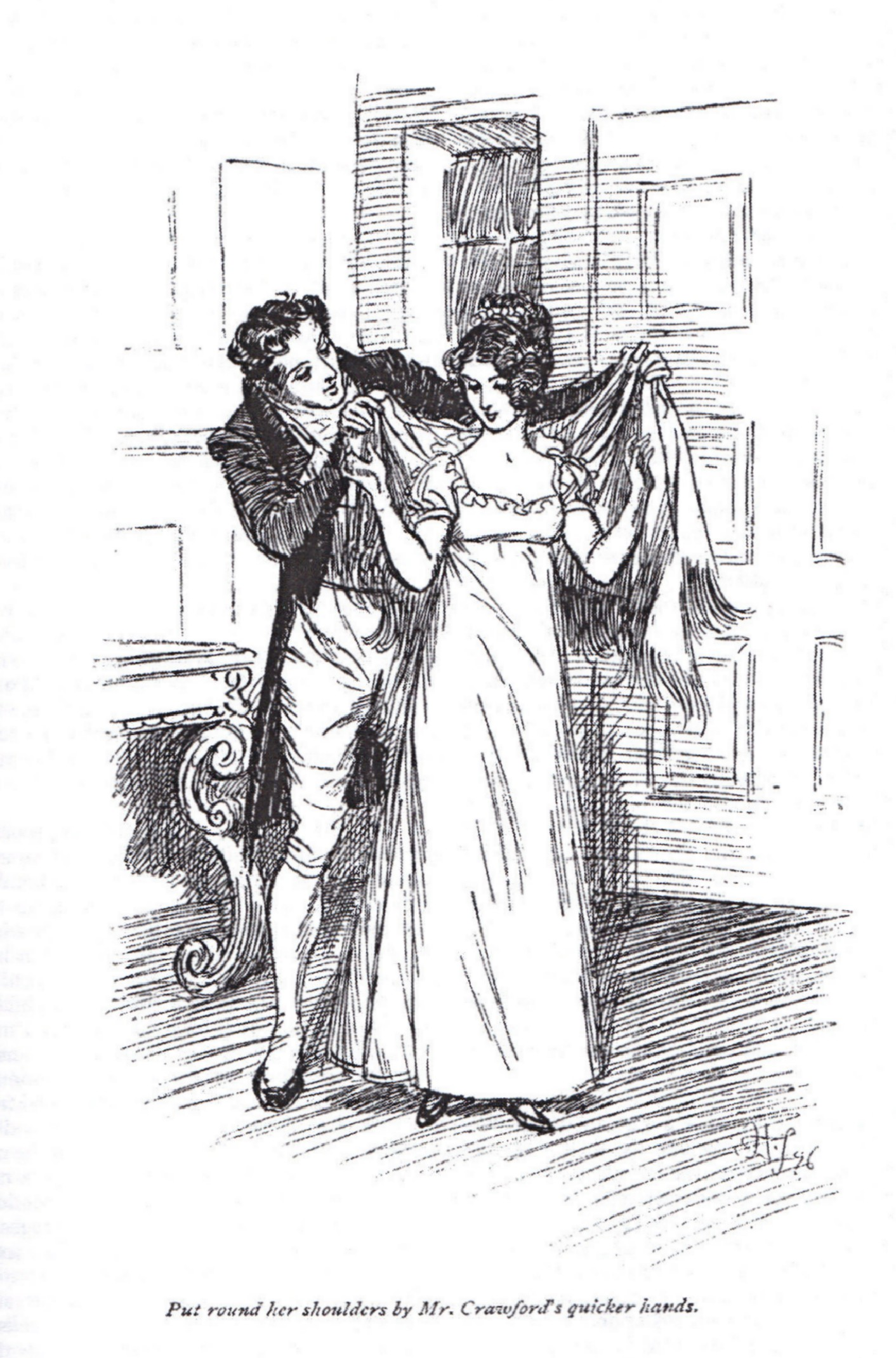 Mansfield Park, Frontispice, illustration du ch 25 : Alors qu'habituellement Edmund rendait ce service à Fanny, Henry s'est précipité pour lui mettre son châle.